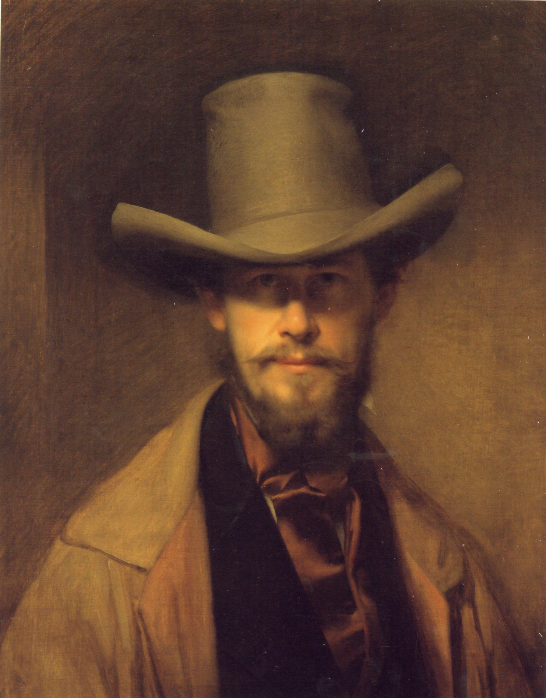 Selbstporträt mit Hut.